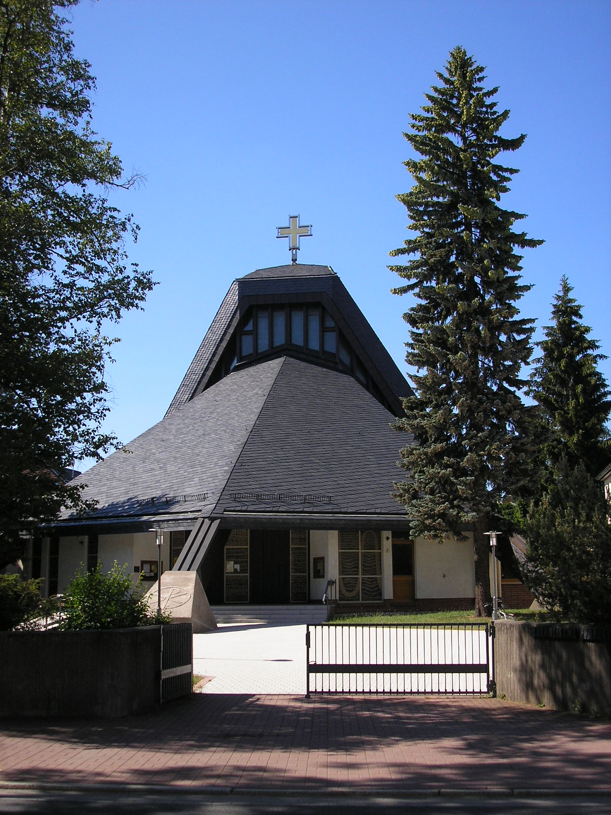 Die katholische Kirche "St. Josef" in Ilmenau (Thüringen). Erbaut: 1981. Stil: Zeltdachkirche.